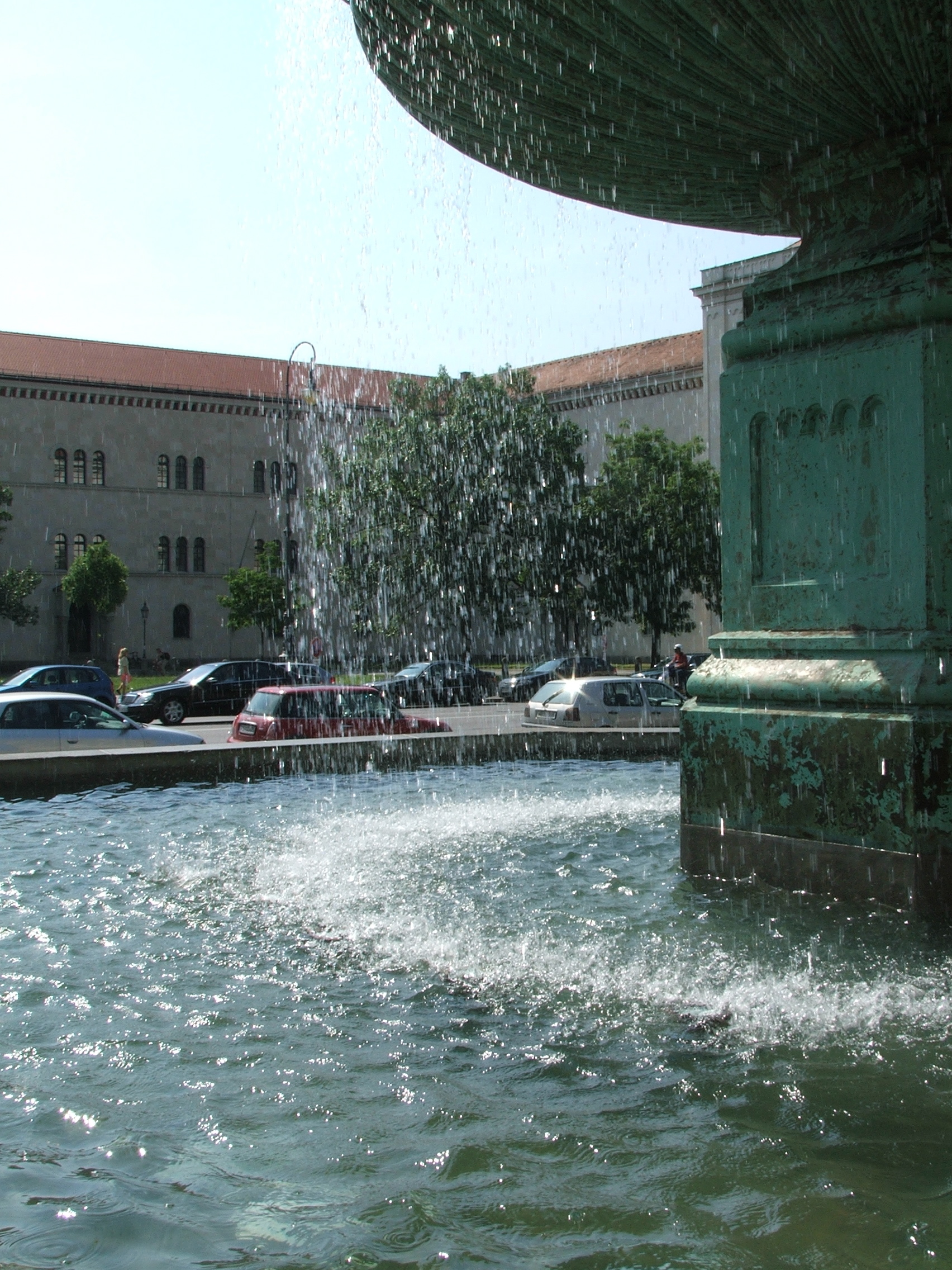 Unibrunnen Nr. 2 (Ludwig-Maximilians-Universität München)